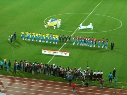 Inicio del partido de cuartos de final de la Copa América 2007 disputado entre Brasil y Chile.